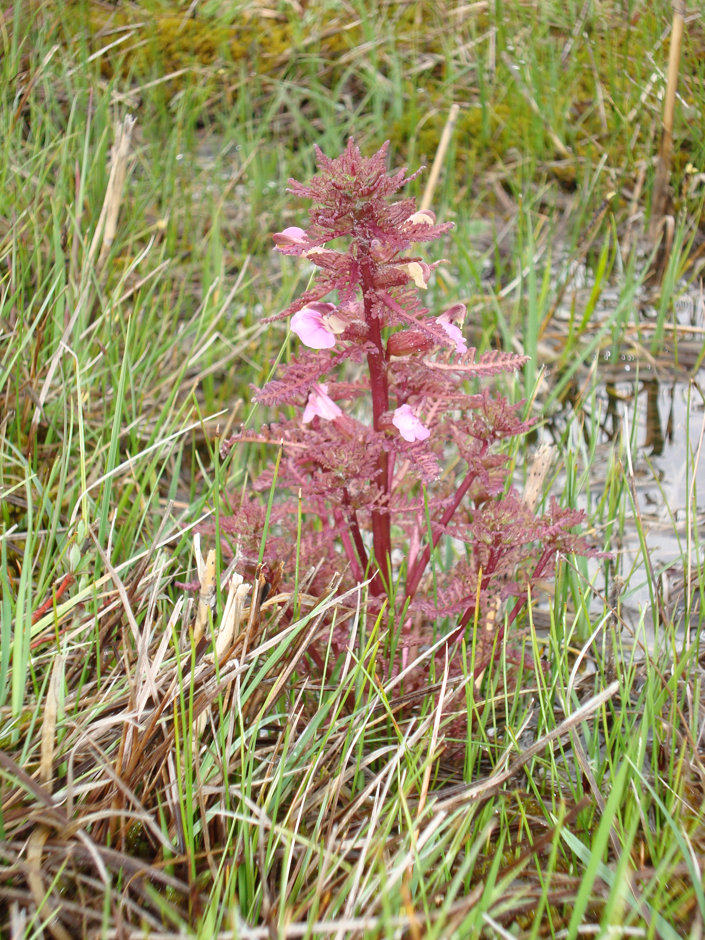 Naturschutzgebiet Kalk-Zwischenmoor Wendischhagen. Sumpf-Läusekraut.